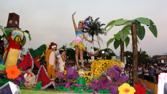 fisteas